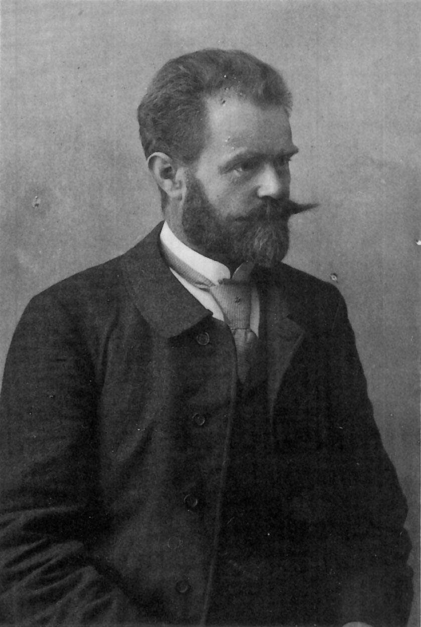 Der Münchner Fotograf Georg Pettendorfer